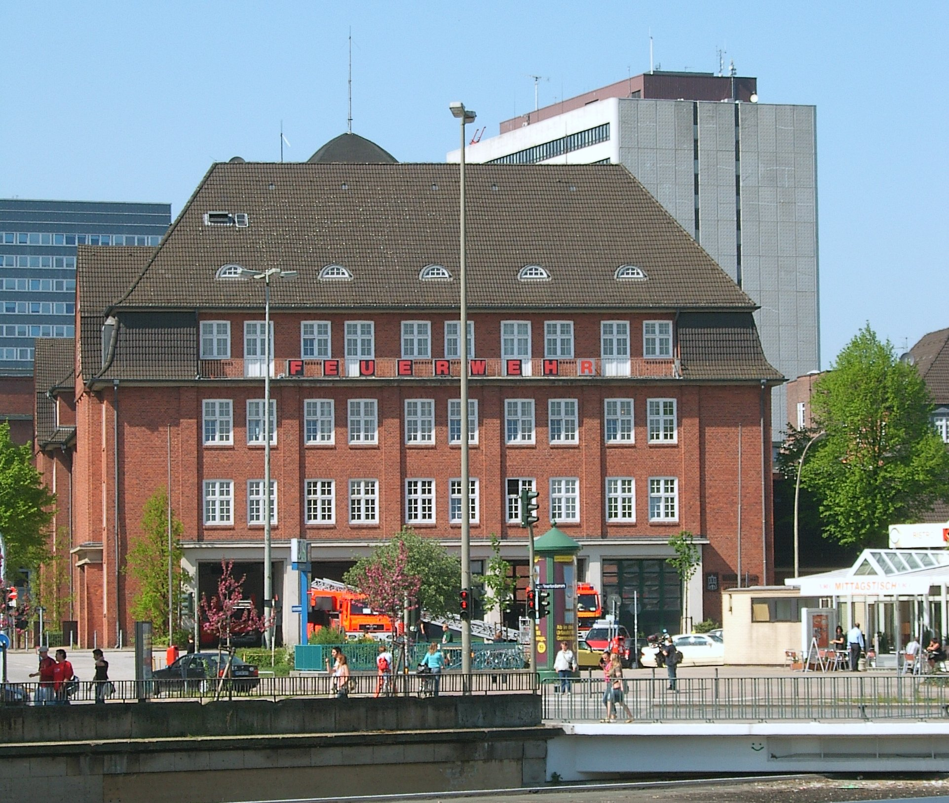 Hamburg, Feuerwache Berliner Tor This is a photograph of an architectural monument.